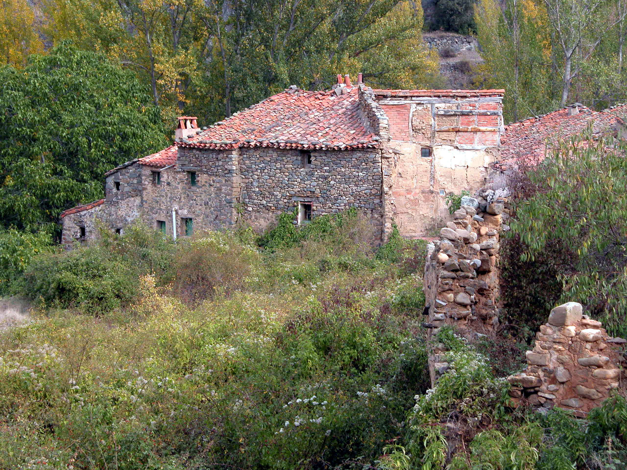 Las Ruedas de Enciso. Aldea de Enciso, La Rioja (España).